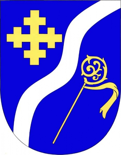 znak, Koněšín, okres Třebíč